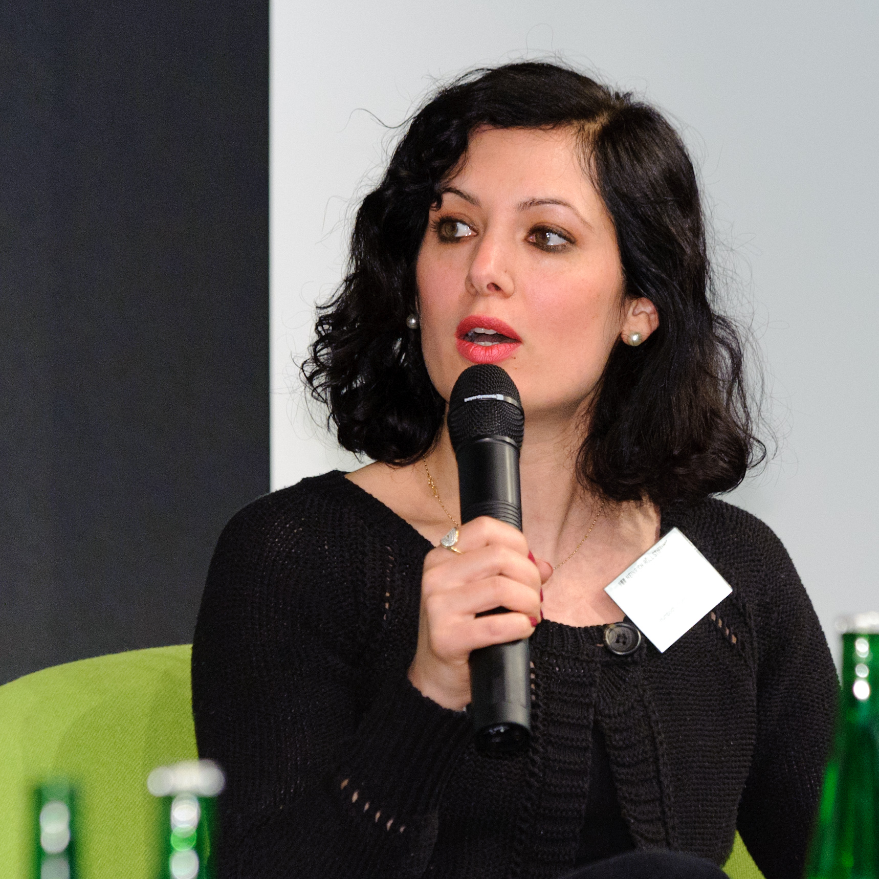 Dr. Naika Foroutan, Humboldt Universität Berlin Foto: Stephan Röhl